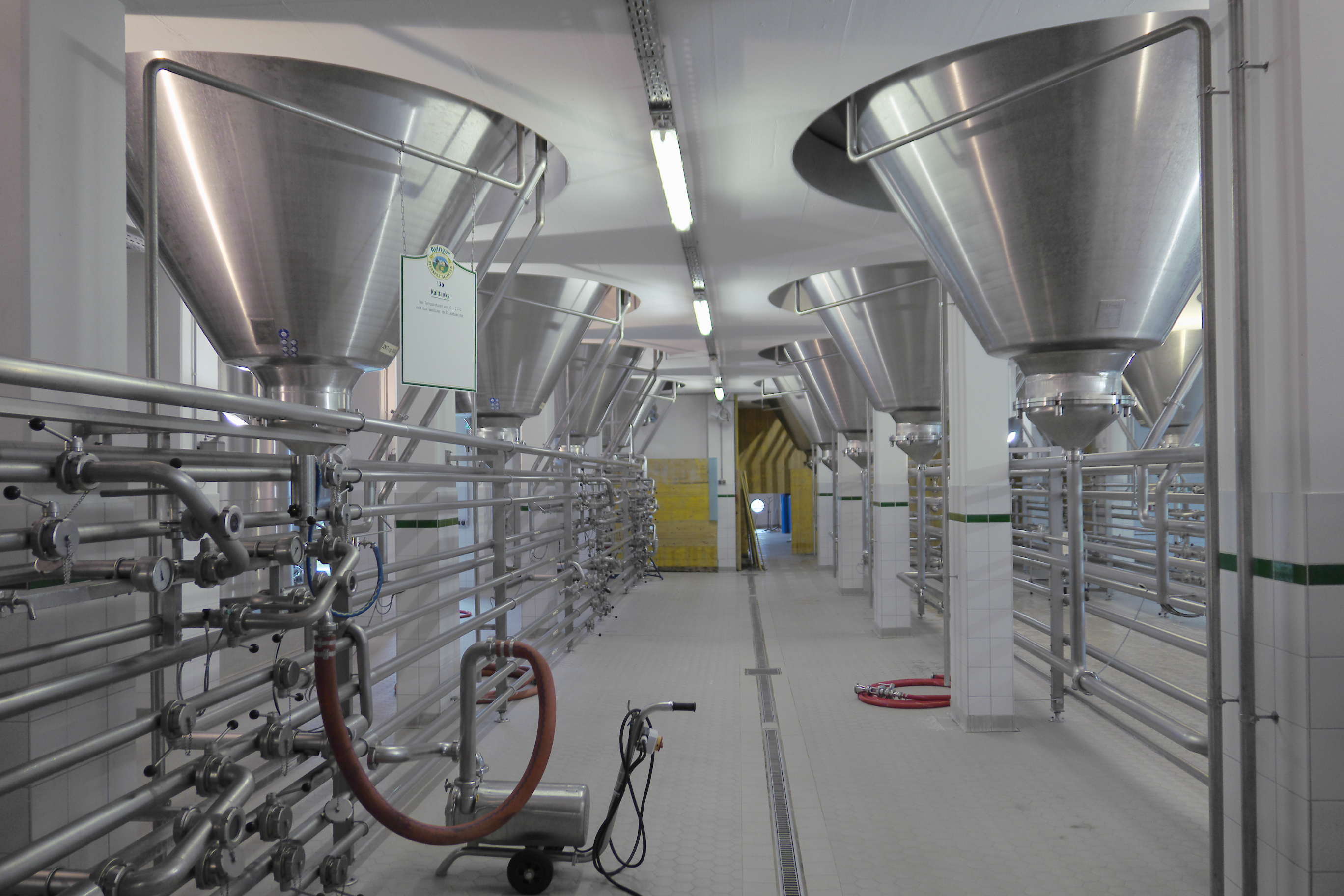 Kalttanks für Weißbier, Brauerei Aying, Bayern, Deutschland